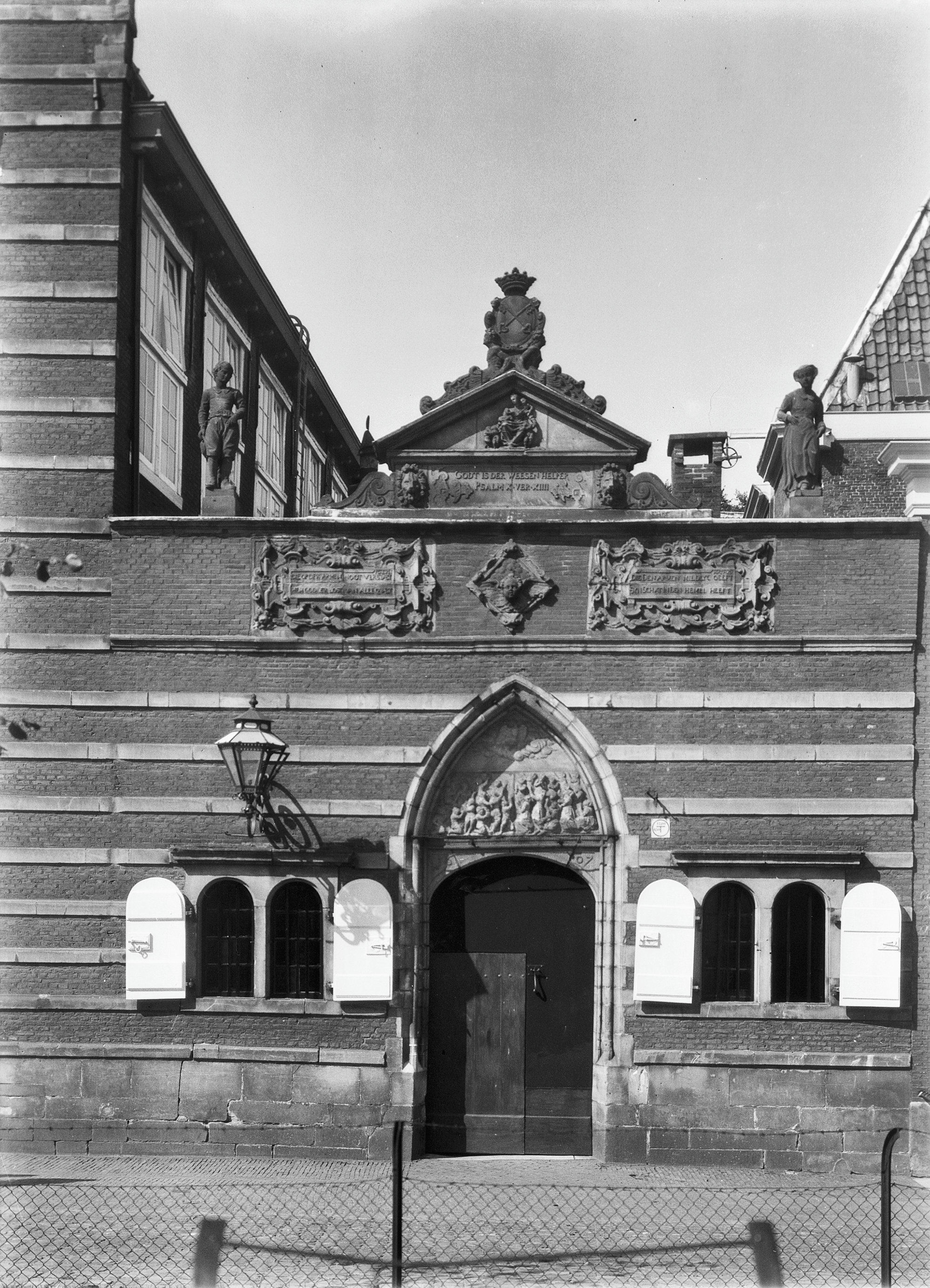 Weeshuis: aanzicht